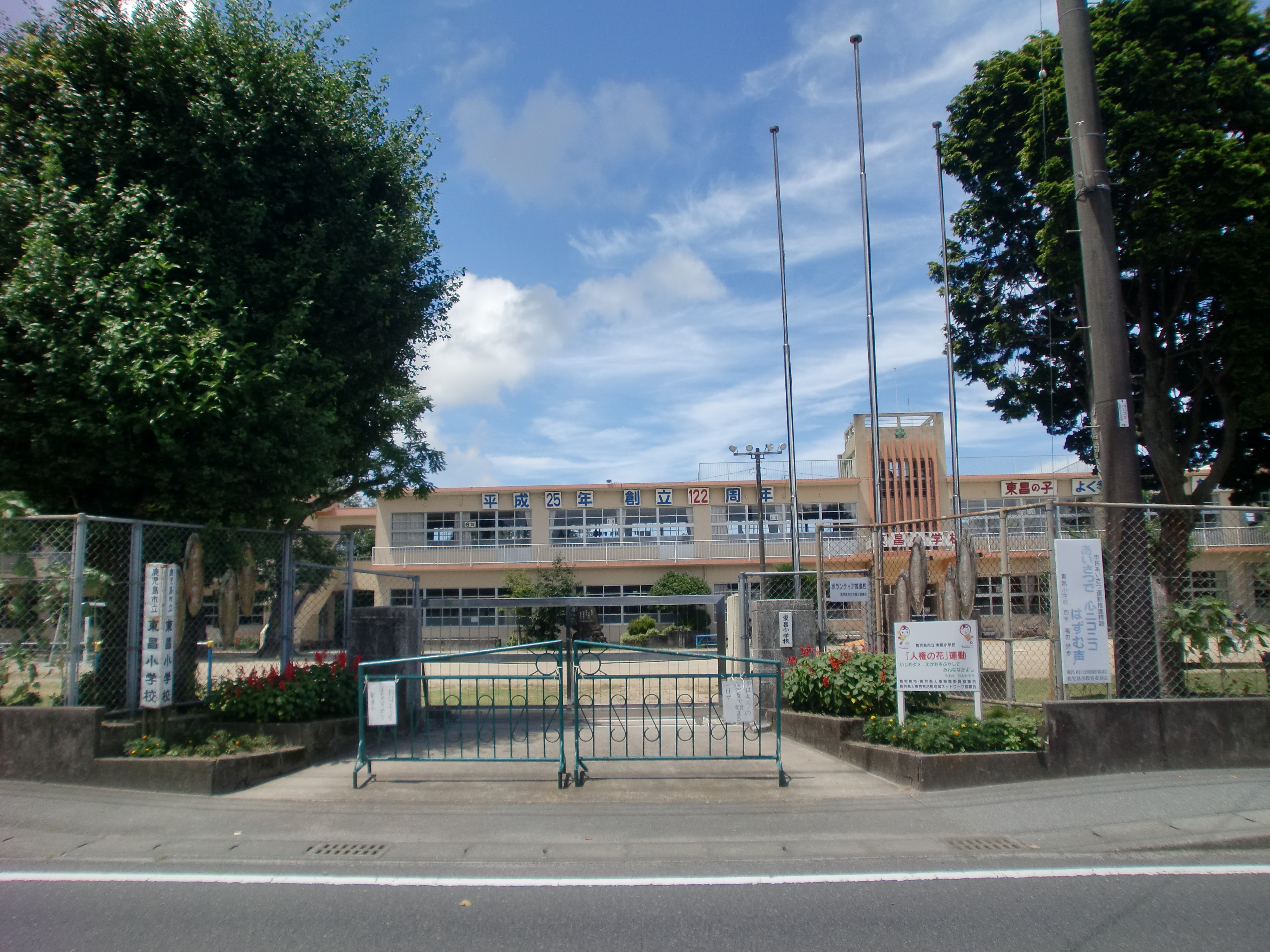 鹿児島市立東昌小学校の外観（再撮影）。